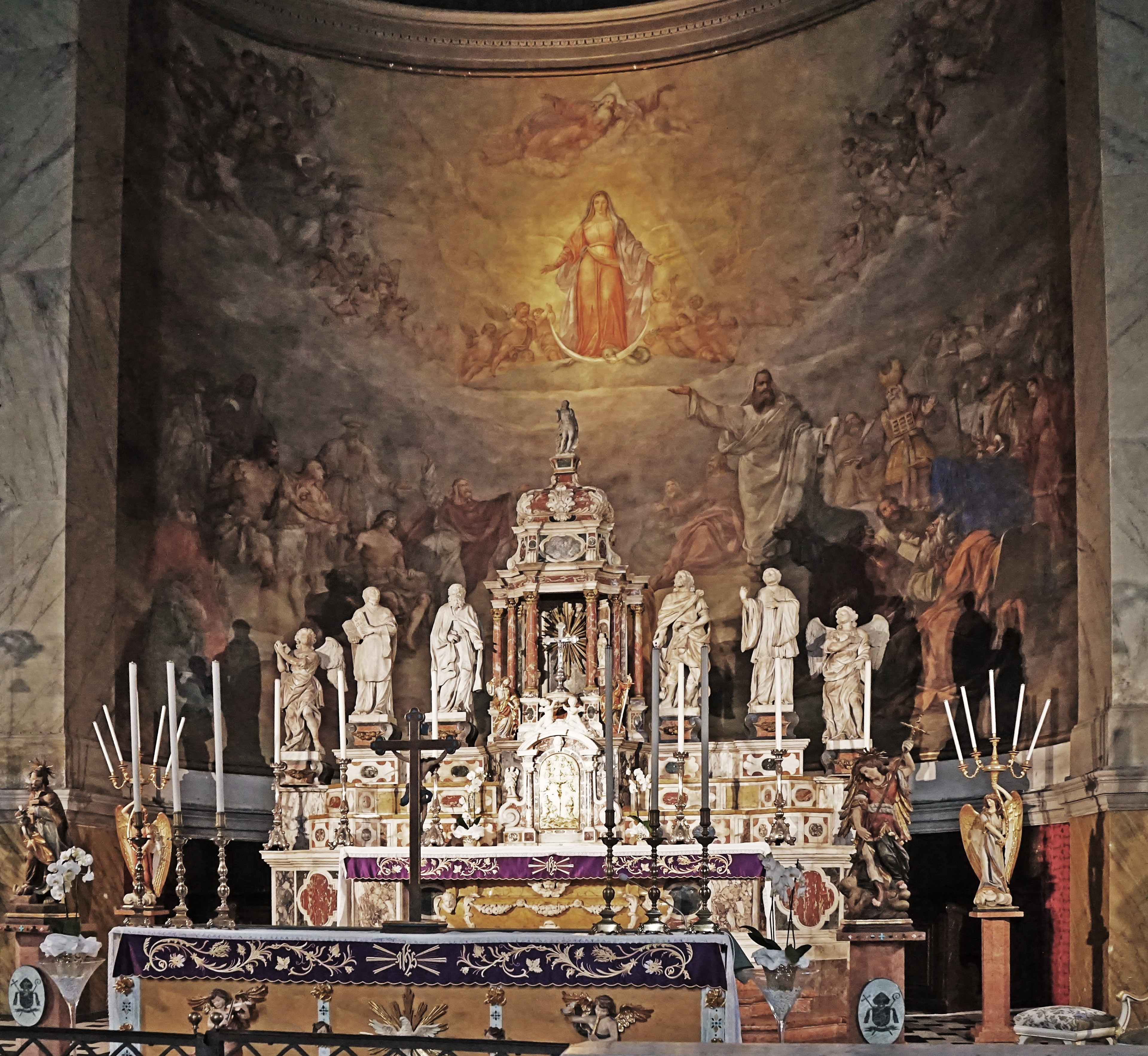 Hochaltar und Apsis der Kirche Santa Maria Maggiore (Triest)